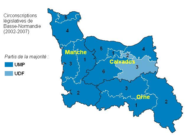 Circonscriptions de Basse-Normandie 2002-07